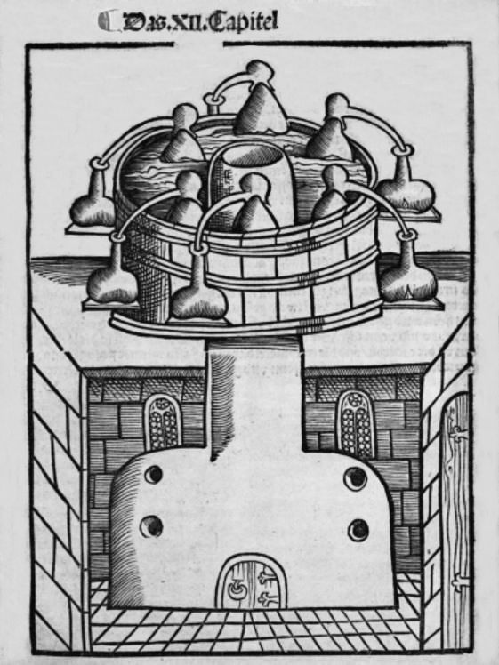 Coupe d'une chaudire H. Brunschwig Liber de arte distillandi de compositis